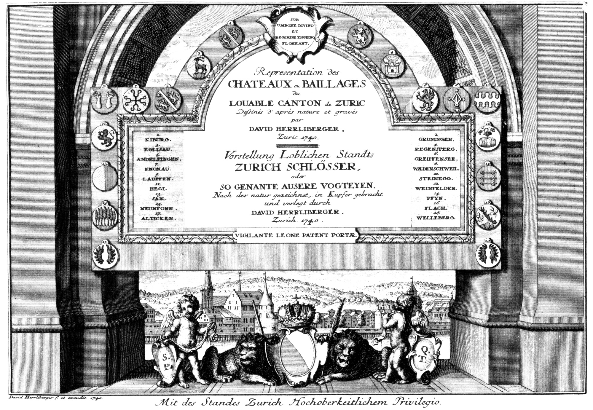 Titelblatt der Publikationsreihe "Landvogteischlösser" von David Herrliberger mit den Wappen der Zürcher Äusseren Vogteien um 1740. Stich von David Herrliberger